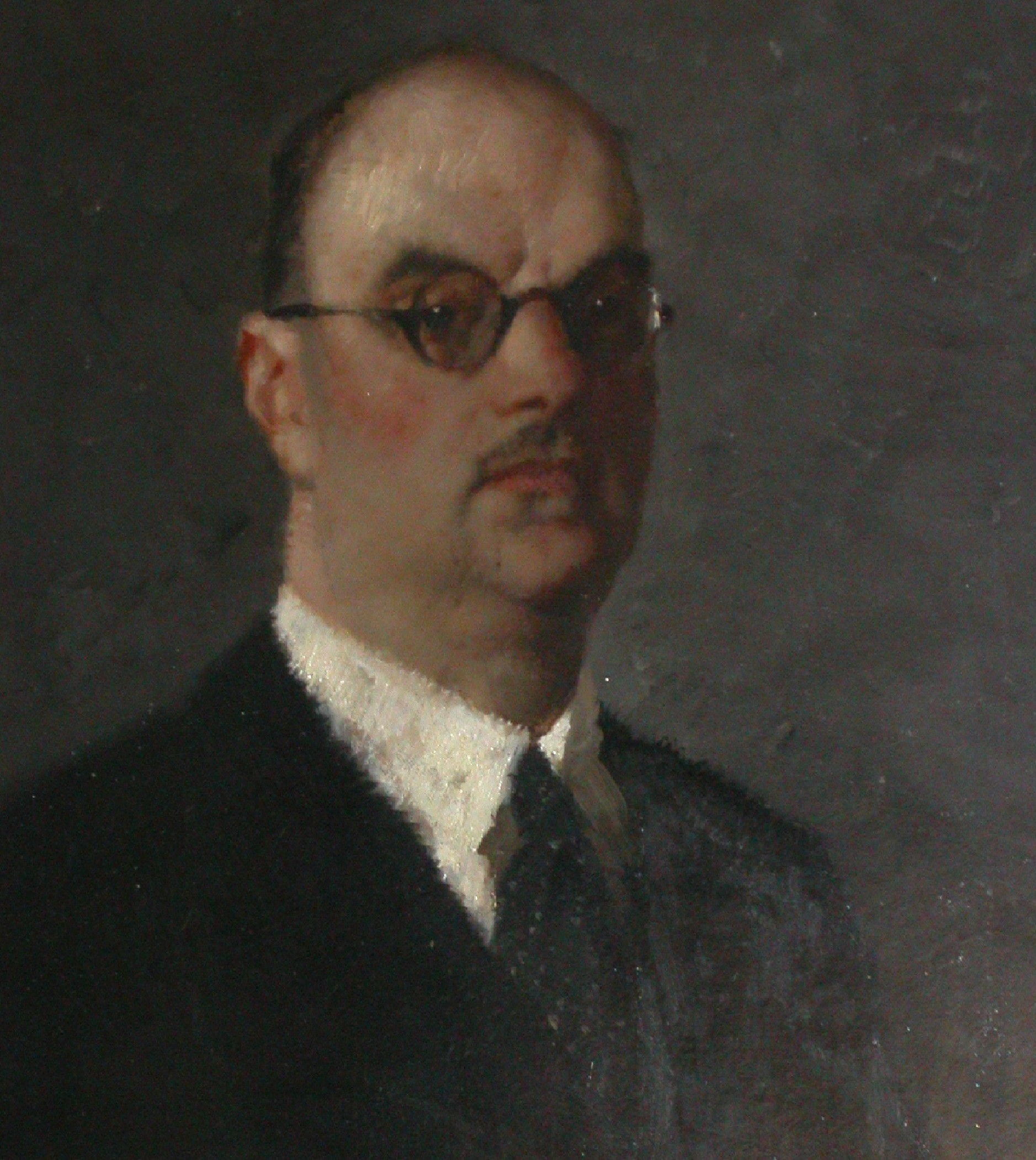 Ritratto di Michele Biancale